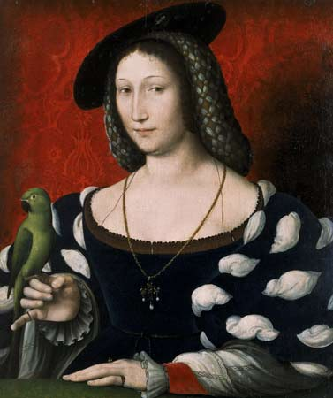 Portrait of Marguerite d'Angoulême (1492-1549)